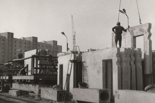 Plattenbau in Dresden-Johannstadt